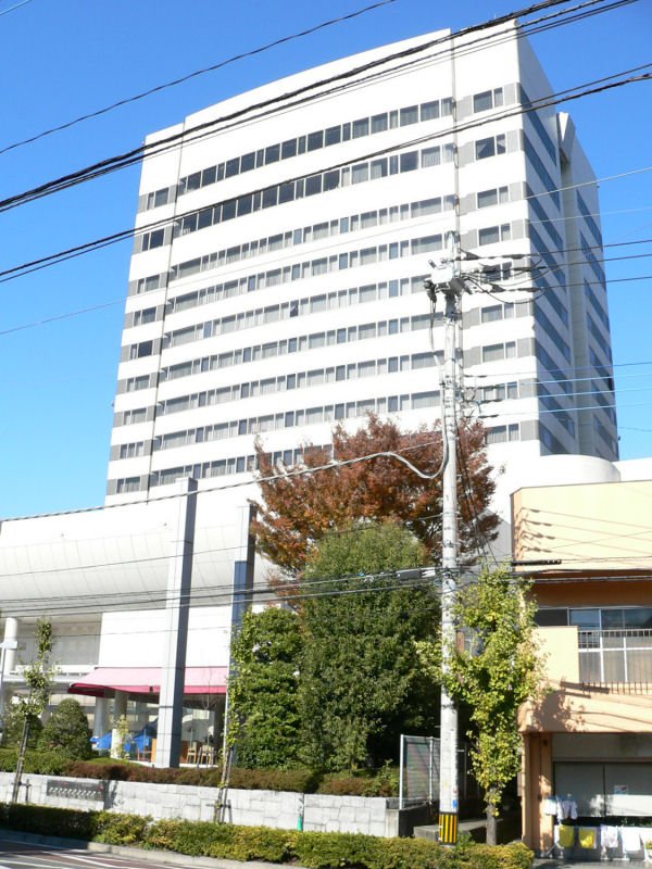 温泉街にあるホテル.